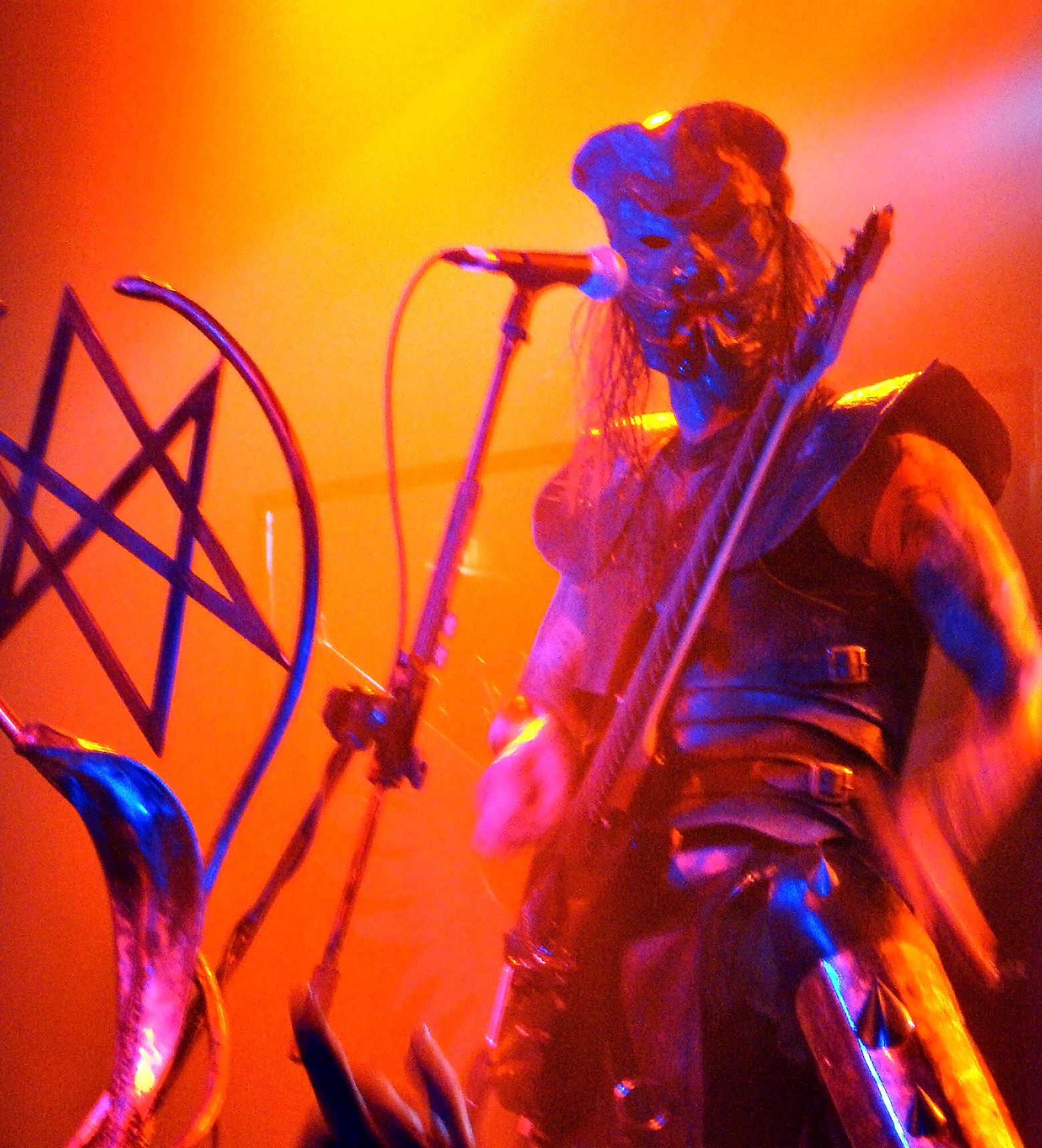 Behemoth en concert à La Locomotive, à Paris, le 17/02/2008: Nergal portant le masque.